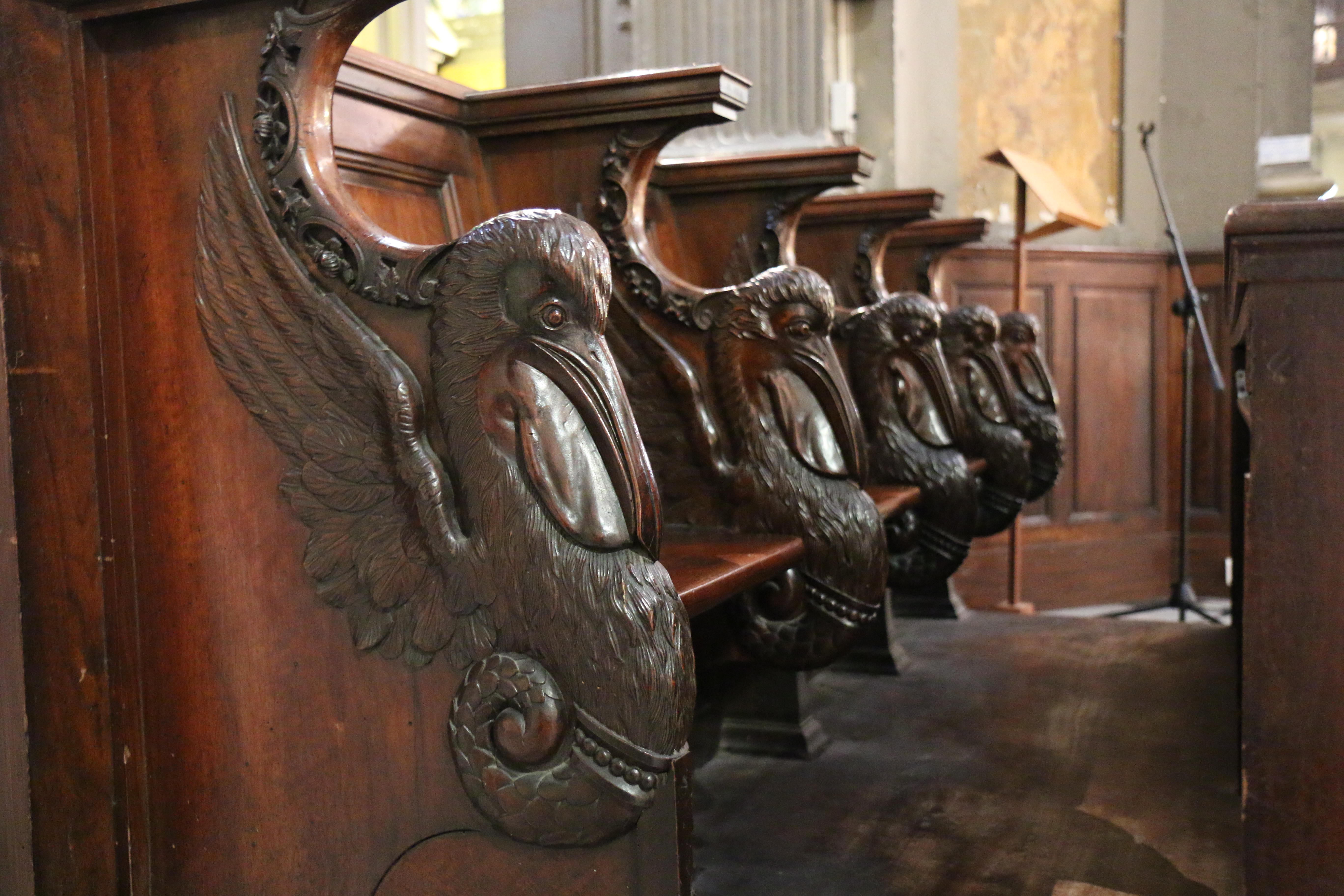 Église de La Trinité-La Palud à Marseille : stalles avec accoudoirs en bois sculpté en forme de pélicans.